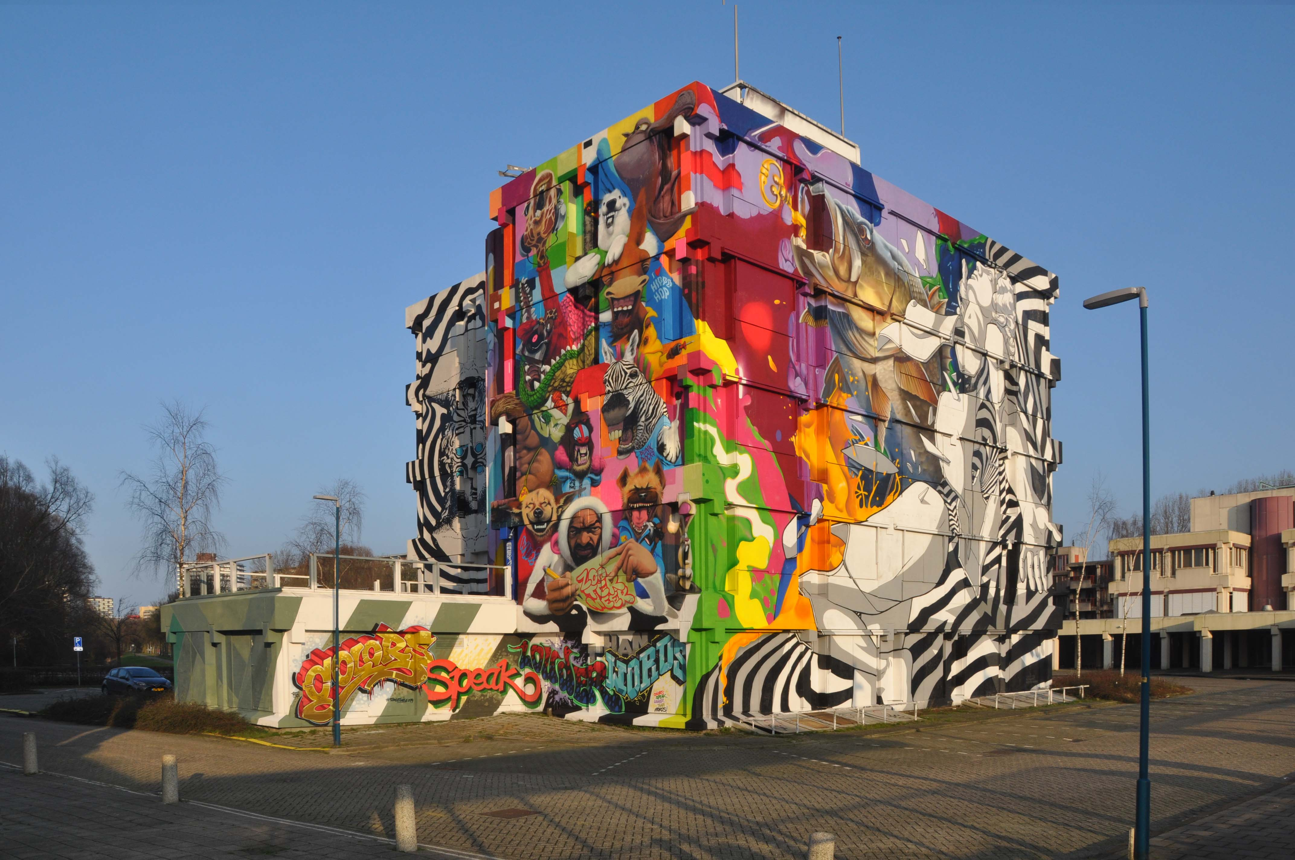 Het gebouw van makelaar Hopman als beschilderd in 2017.